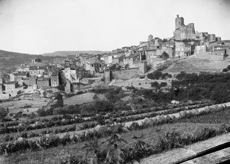 Imatge